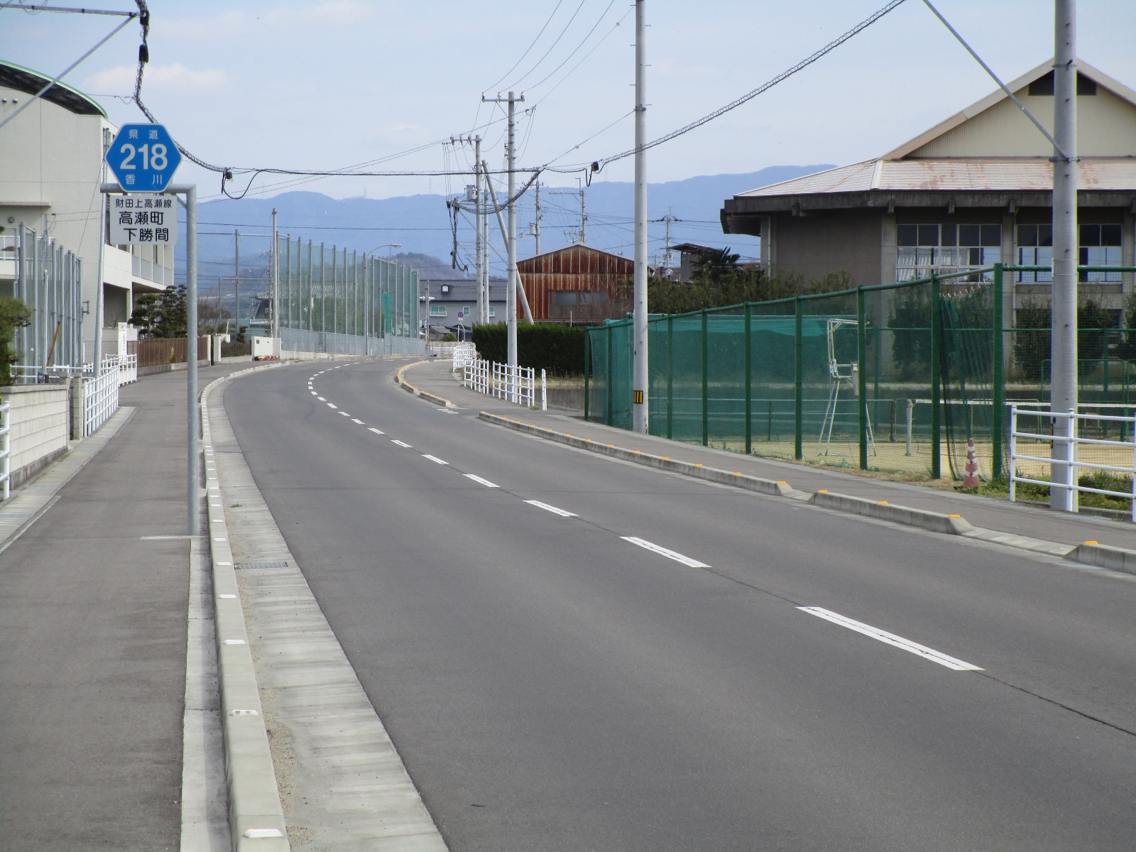 香川県道218号財田上高瀬線（香川県三豊市高瀬町下勝間、高瀬中学校付近より撮影）